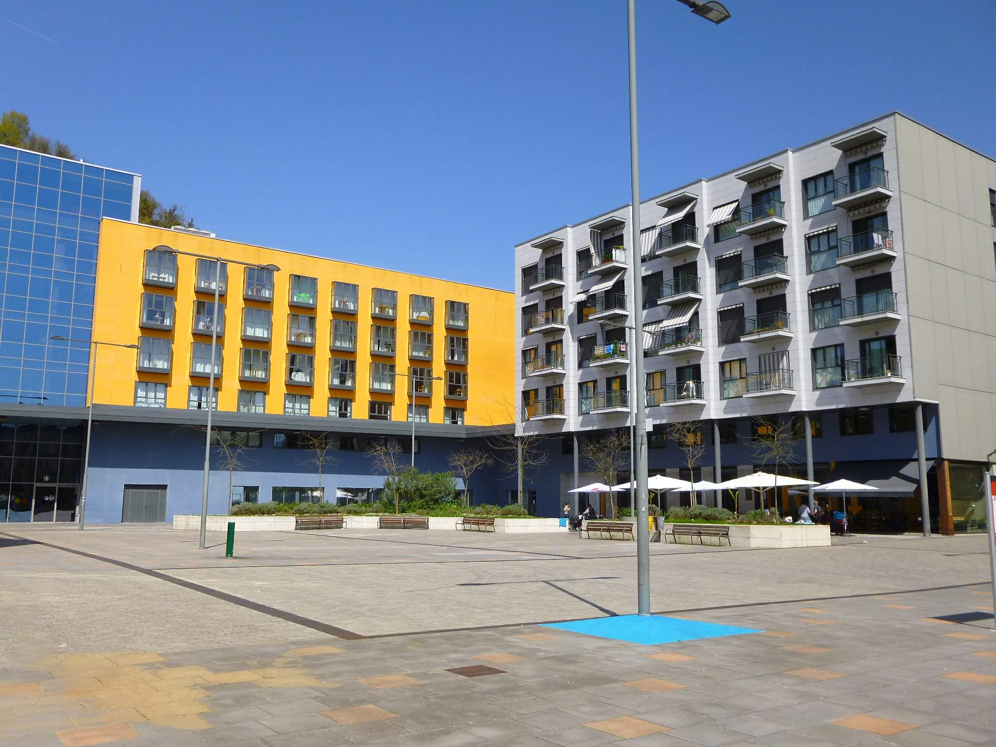 Centro Asistencial Uzturre (Tolosa, Gipúzkoa)